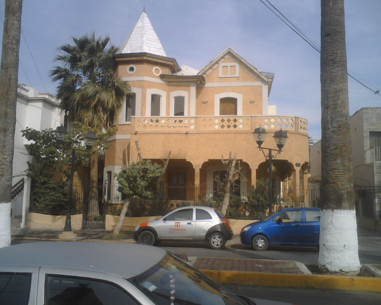 Antiguo chalet ubicado sobre Av. Morelos